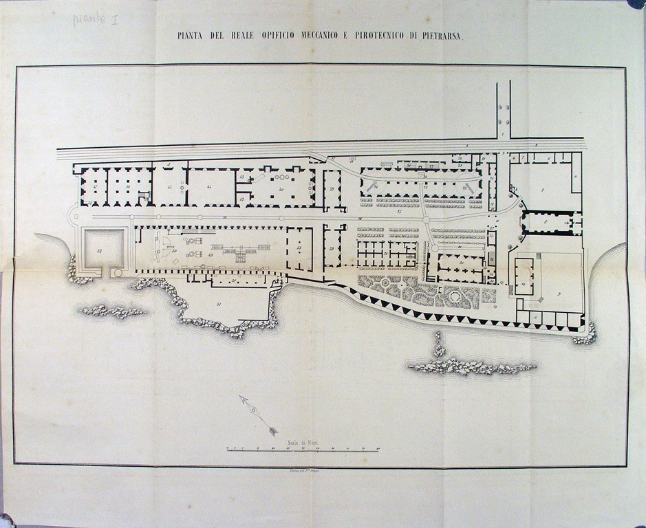 Pianta del Reale Opificio meccanico e pirotecnico di Pietrarsa, pubblicata nel volume Sullo stabilimento metallurgico e meccanico di Pietrarsa, Torino 1861. Relazione del Signor Cavaliere Sebastiano Grandis ispettore delle strade ferrate dello Stato. Il Reale opificio di Pietrarsa fu fondato nel 1840 alla periferia di Napoli dal re Ferdinando II di Borbone e si sviluppa ancora oggi su trentamila metri quadrati di superficie. Vi venivano costruite, oltre alle prime locomotive, opere pirotecniche per uso bellico, costruzioni per la Marina, macchine a vapore e opere d'arte; oggi e' la sede del Museo nazionale ferroviario (AS Napoli, Fondo Ferrovie, 71/9, all. I)